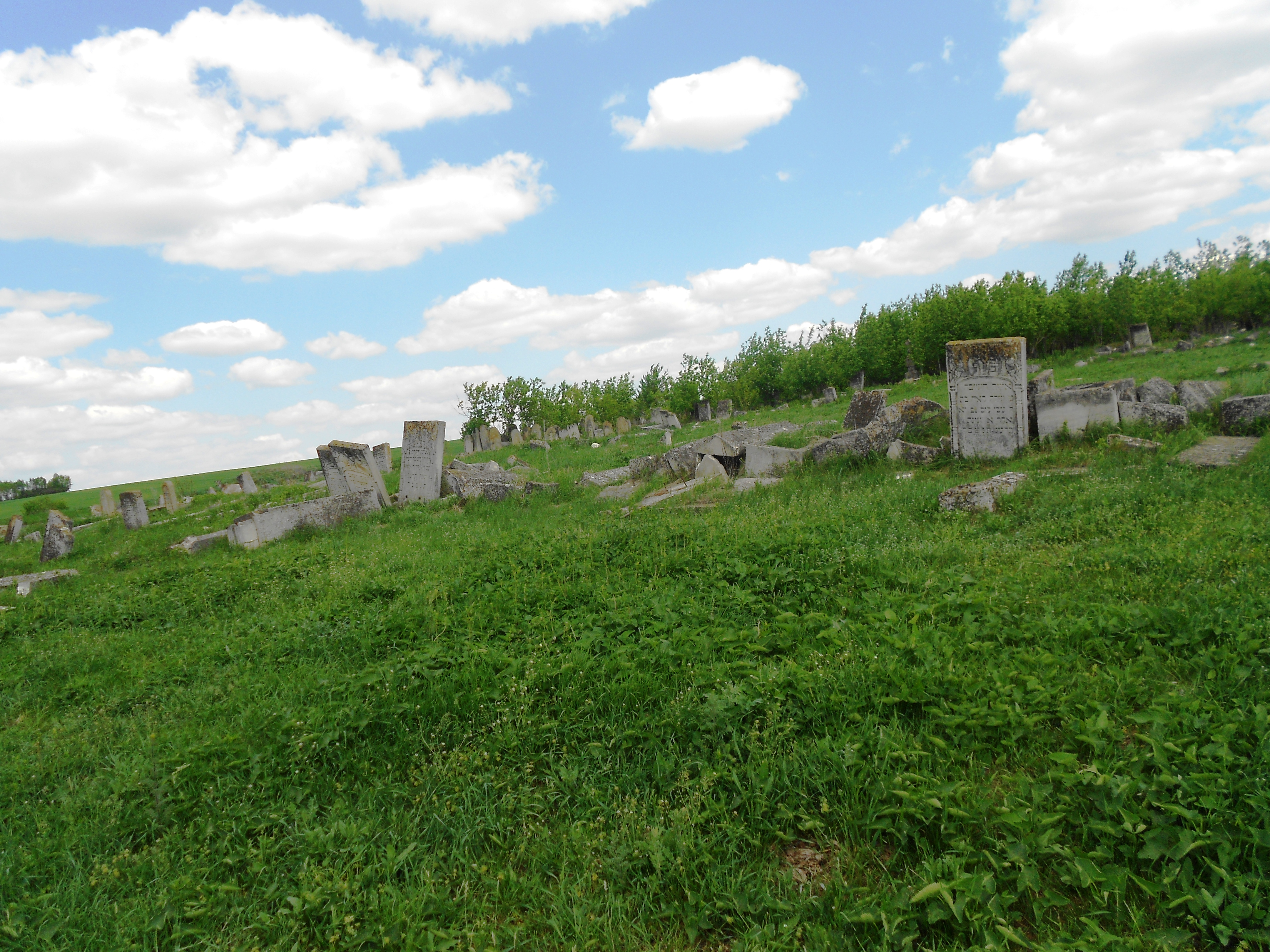 Cimitirul evreiesc din Briceva, Moldova